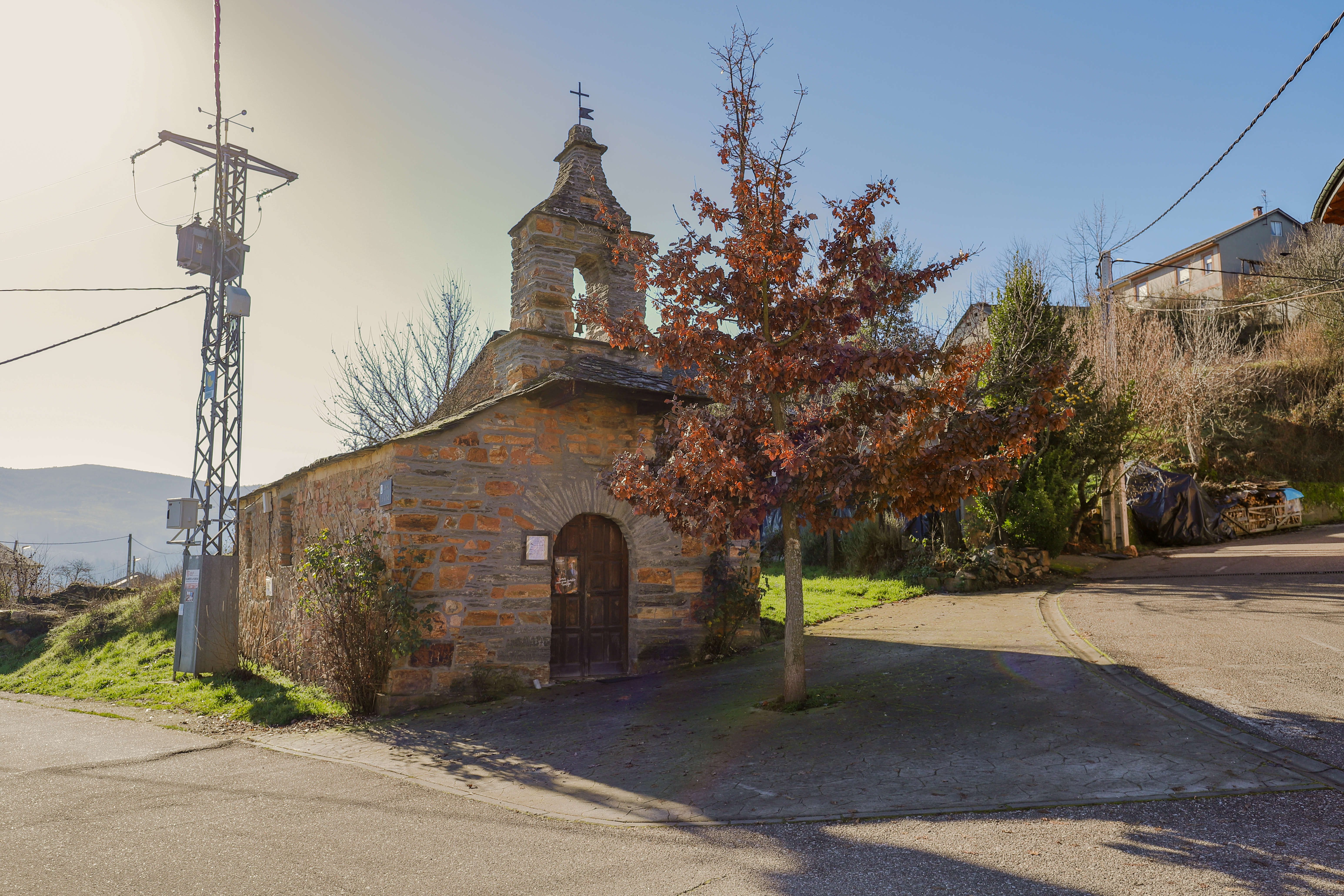 Sésamo es una localidad que pertenece al municipio de Vega de Espinareda, comarca de El Bierzo, provincia de León.